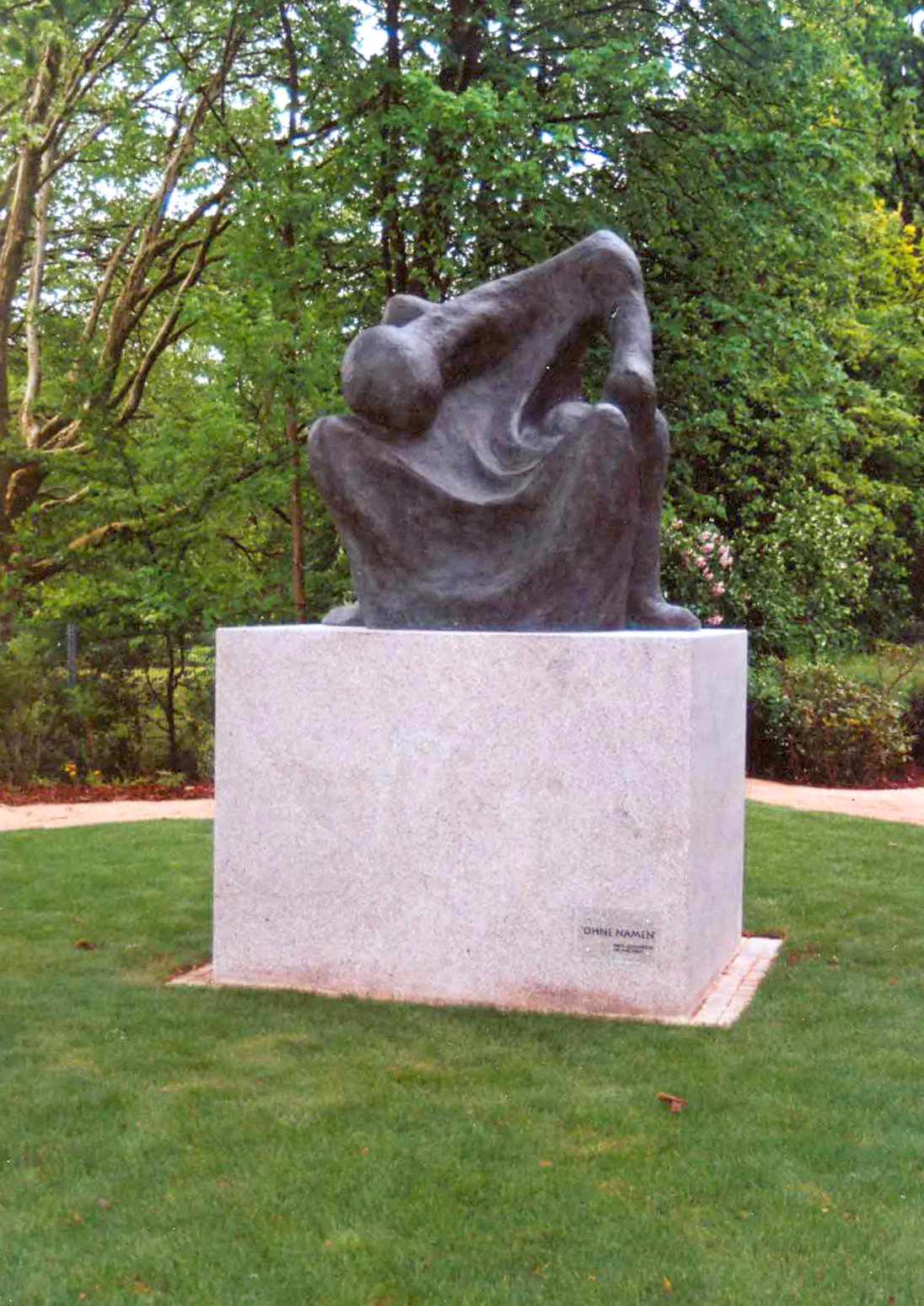 Vittore Bocchetta - ohne Namen - Mahnmal Hersbruck Rosengarten